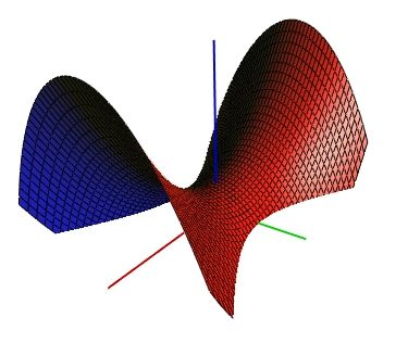 Hyperbolický paraboloid.